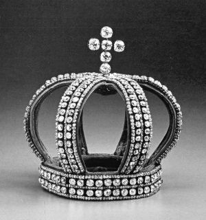 Императорская венчальная корона (1840/1884) — бриллиантовая венчальная корона работы знаменитой петербургской фирмы «Болин». Последняя невеста, голову которой она украшала в 1894 г., — Александра Фёдоровна. В 1927 году была продан на аукционе «Кристис» в Лондоне. Позже его не купила Мерривезер Пост для своего музея царских сокровищ в поместье Хиллвуд под Вашингтоном.